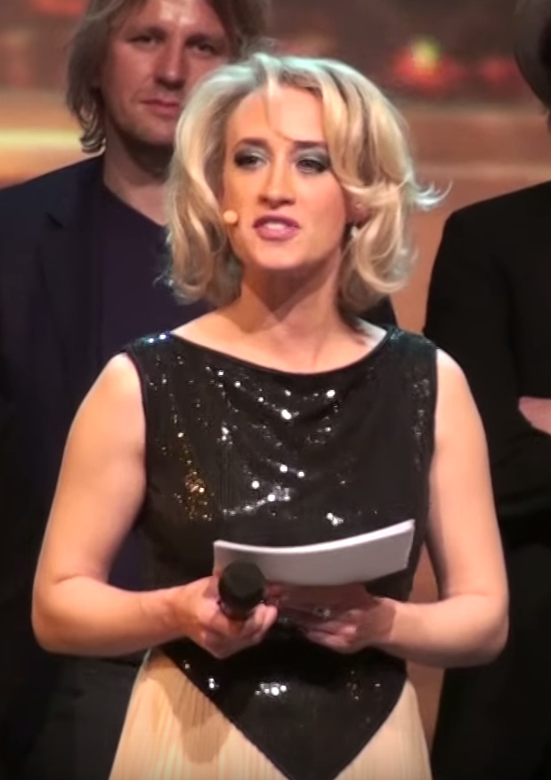 De Tegel 2011 publieksprijs uitreiking en finale. De avond werd gepresenteerd door Eva Jinek.